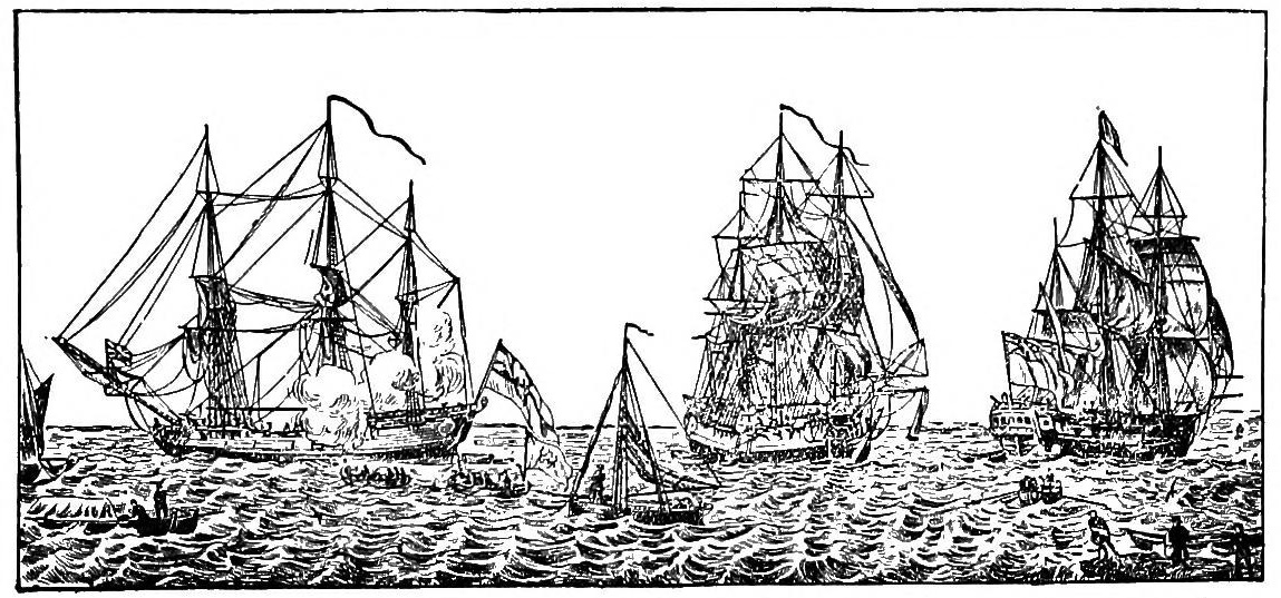 Les vaisseaux anglais Hamshire (56 canons), Dehring (36) et Hudson Bay (32) dans la baie d'Hudson en 1697. Guerre de la ligue d'Augsbourg. Dessin publié en 1900 dans The Great Company. Being a History of the Honourable Company of Merchants-Adventurers Trading into Hudson's Bay. Auteur de l'ouvrage : Willson Beckles. Avec reproduction d'images d'époque. Illustrations complémentaires d'Arthur Heming.